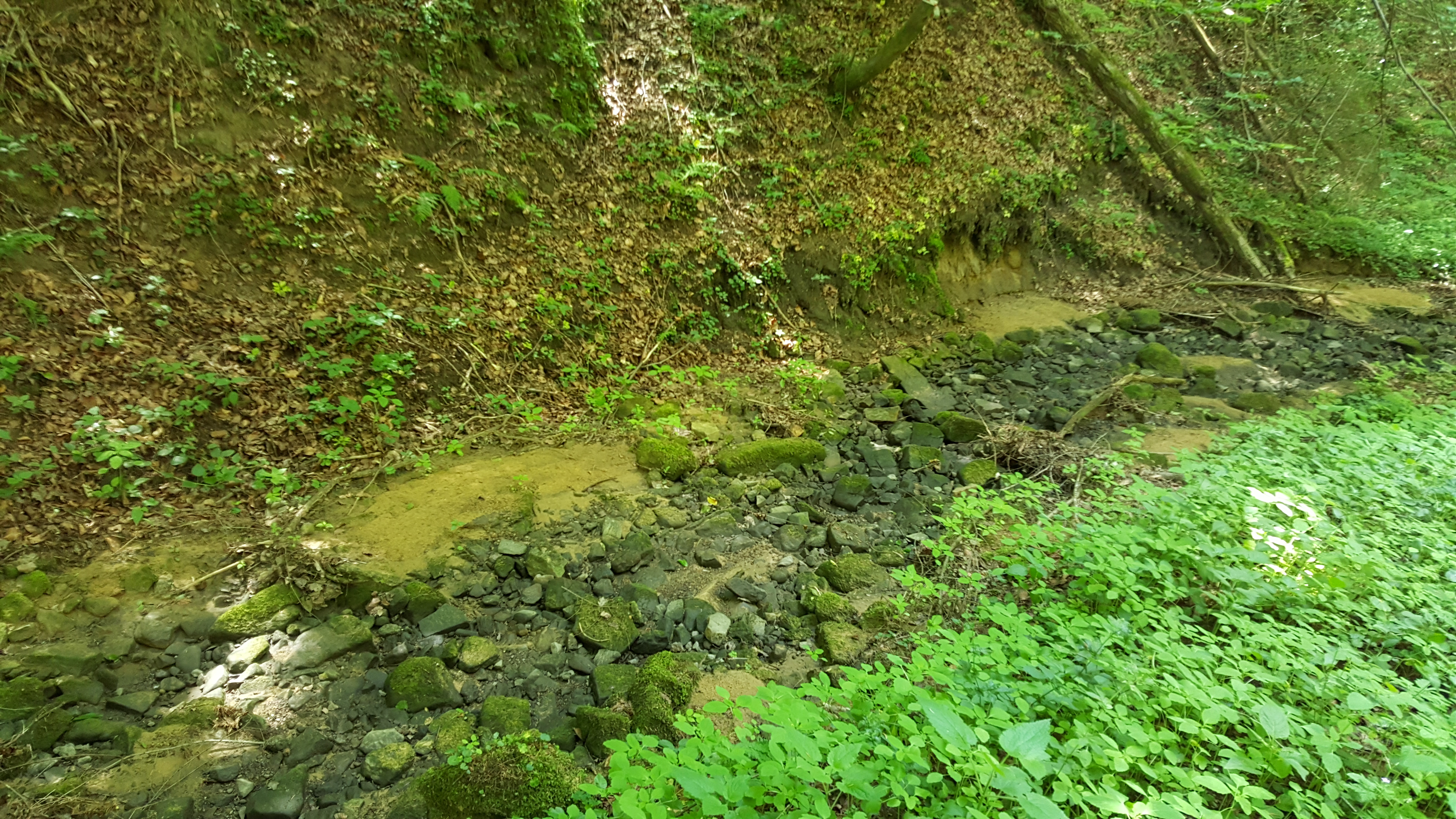 D'Huerbaach am Mee 2017 ouni Waasser